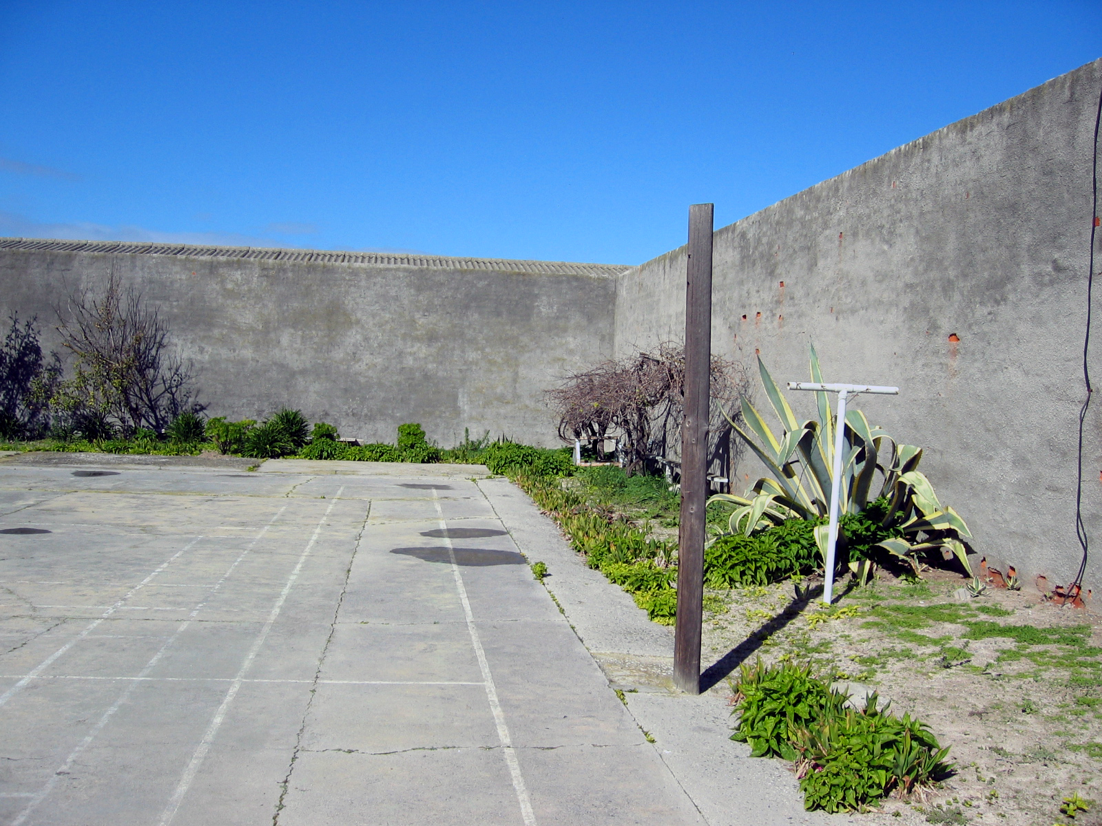 Südafrika, Robben Island, Gefängnishof